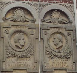 tinkstiennen halbertsma's